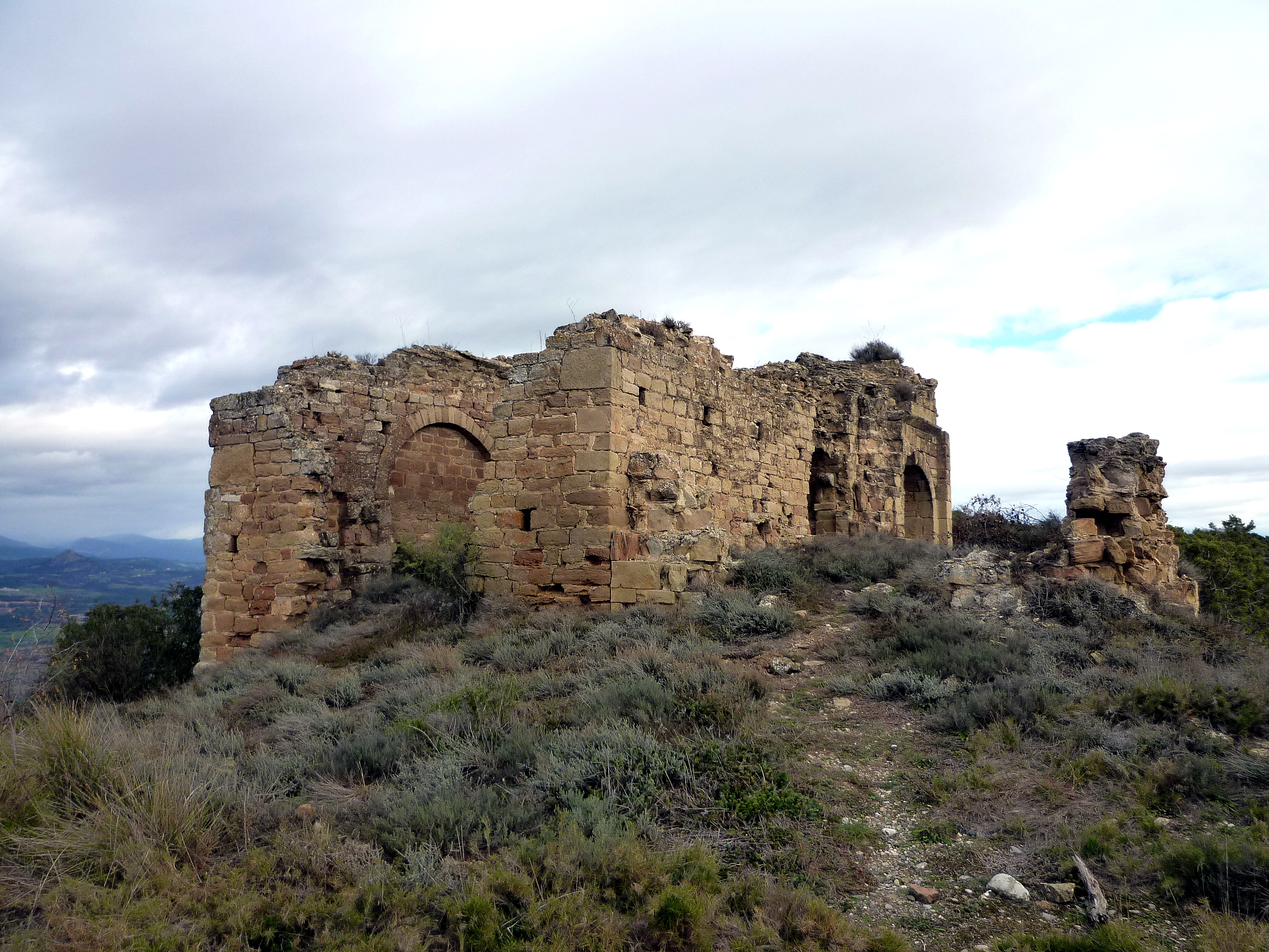 Sant Miquel de Grialó (Artesa de Segre): vista des del castell